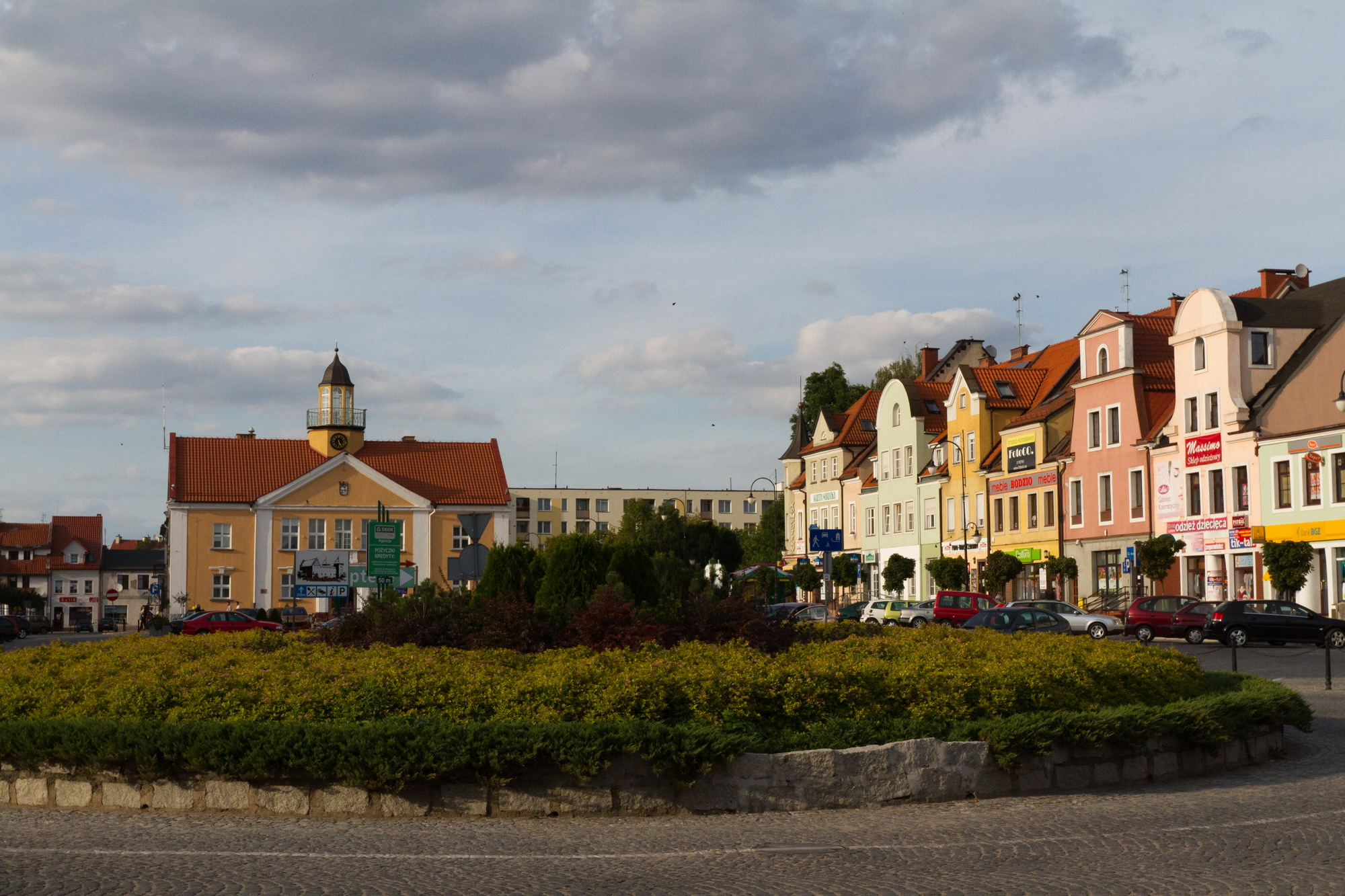 Plac Wolności w Nidzicy, w tle Urząd Miasta Unknown freedom square in nidzica